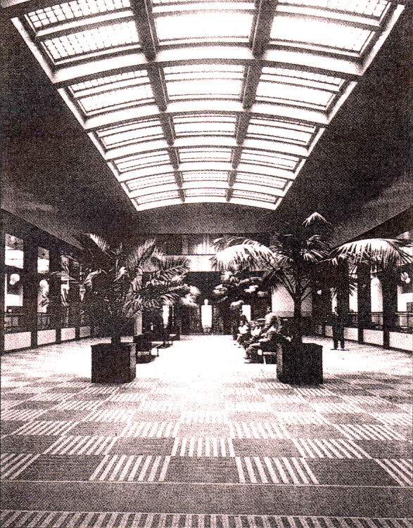 interiér poštovej budovy